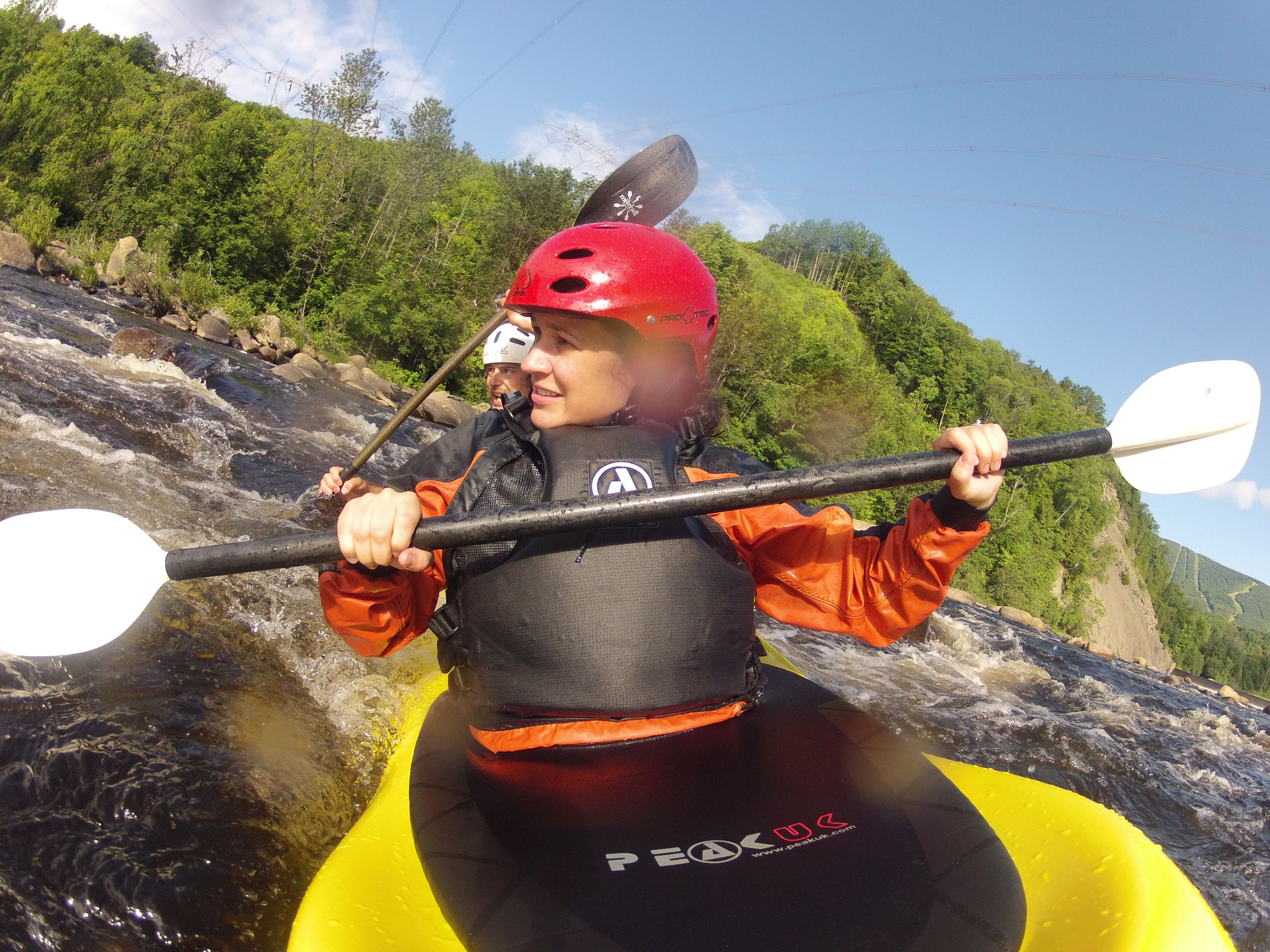 Descente de la section après le barrage.